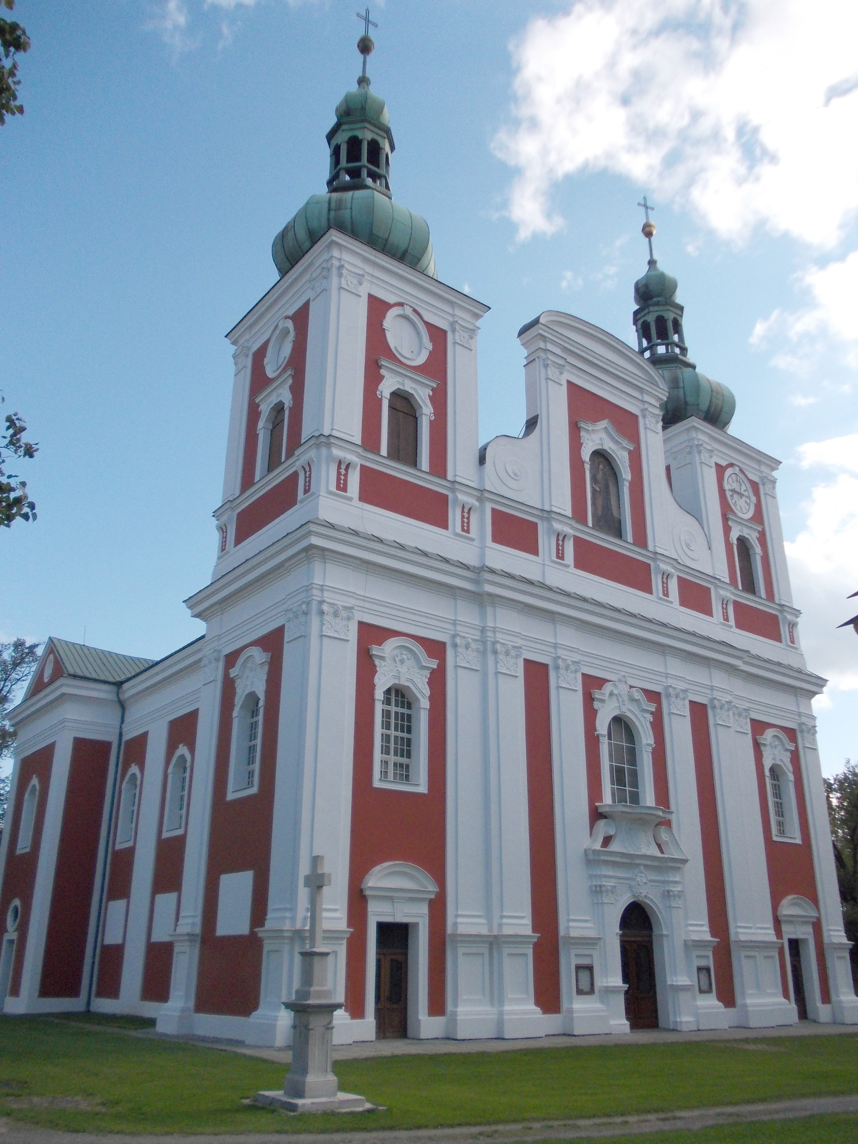 Budova kostela Panny Marie Sedmibolestné, na kopci Cvilíně v Krnově.